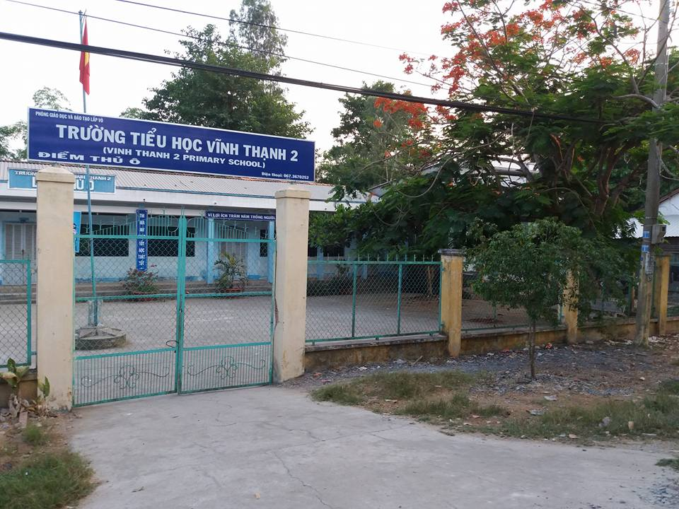 Trường Tiểu học Vĩnh Thạnh 2 (điểm Thủ Ô), Lấp Vò